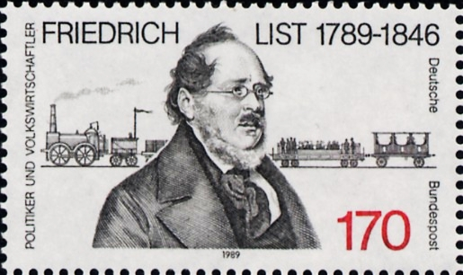 Friedrich List (timbre RFA / Briefmarke BRD) Michel-Katalog-Nr: 1429